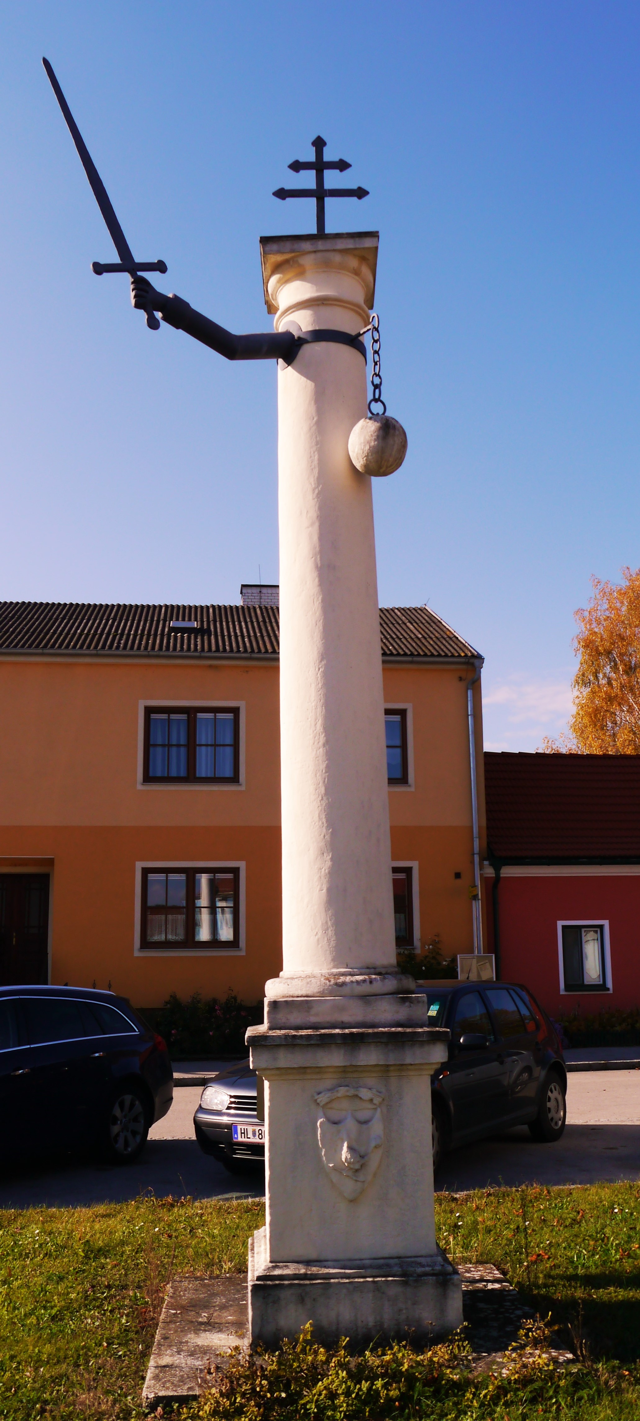 Pranger